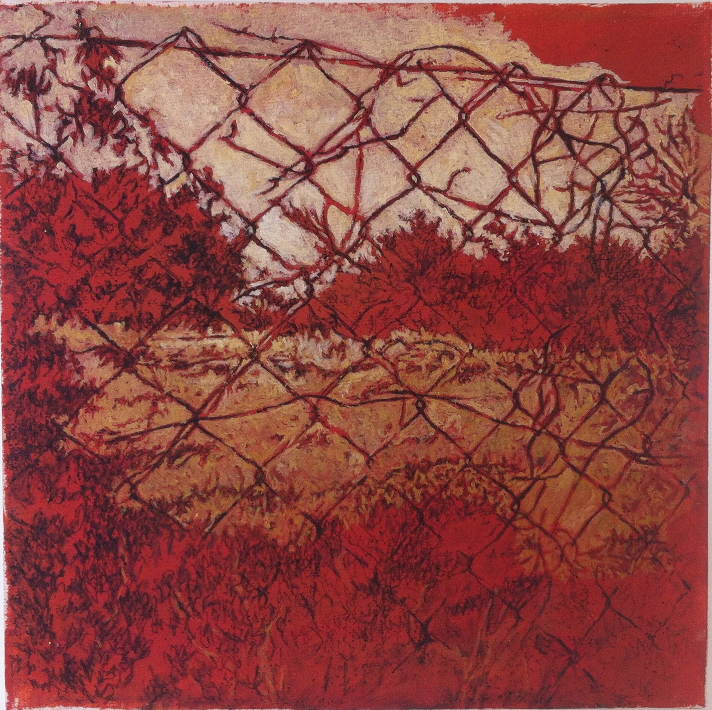 מסדרת הפרדסים